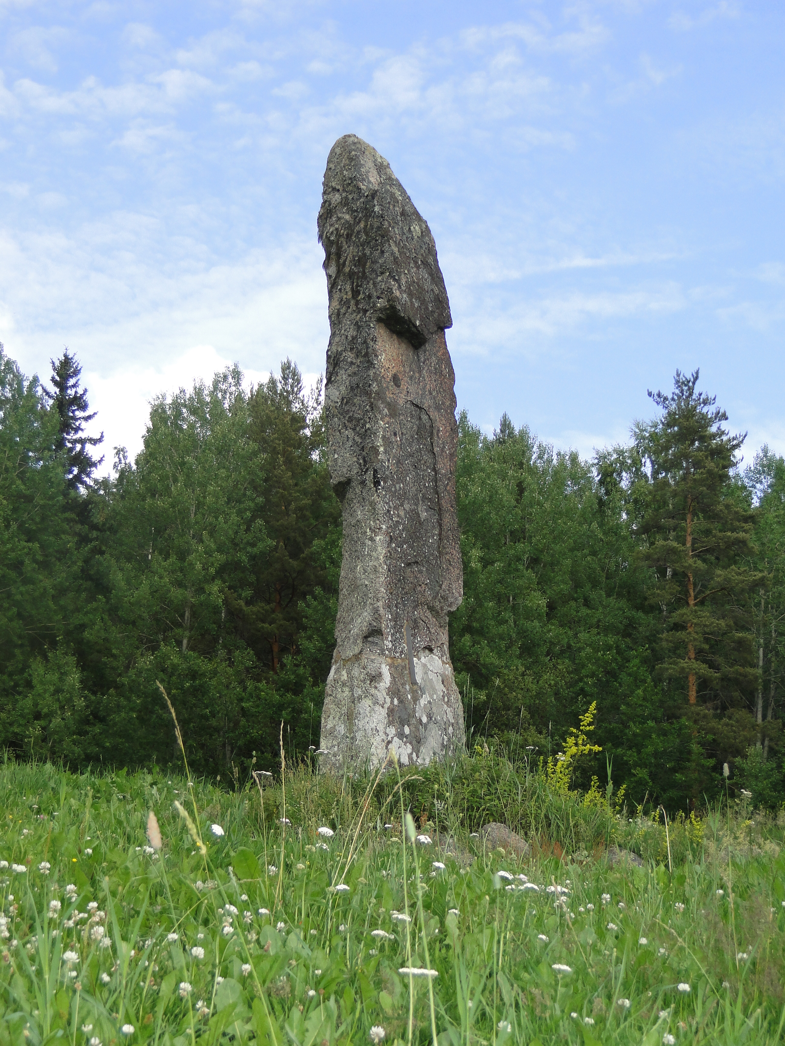 Bautasten. En stor rest sten vid landsvägen vid Boda i Odensvi församling.